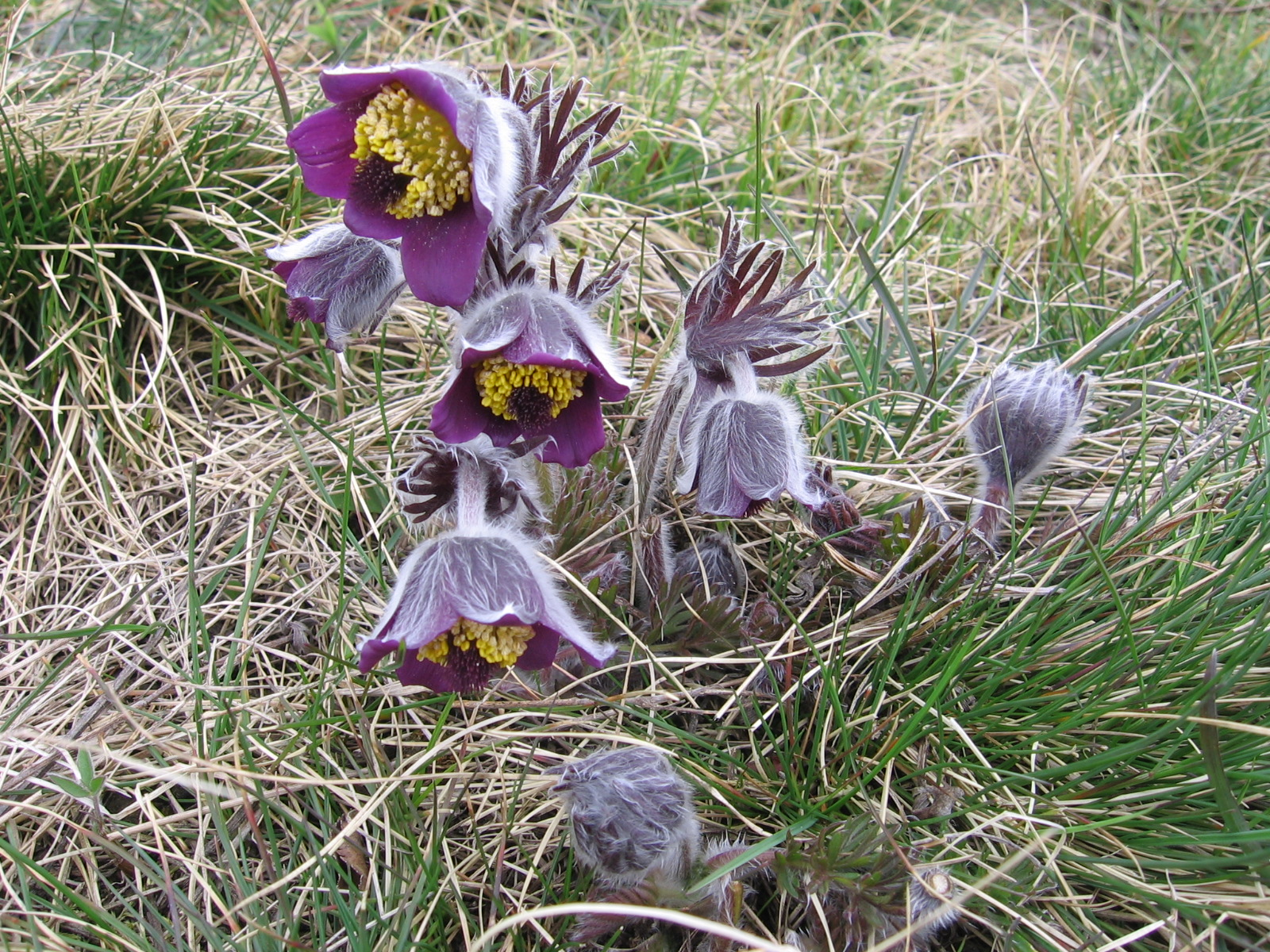 Koniklecová rezervace na Holém vrchu, okres Litoměřice